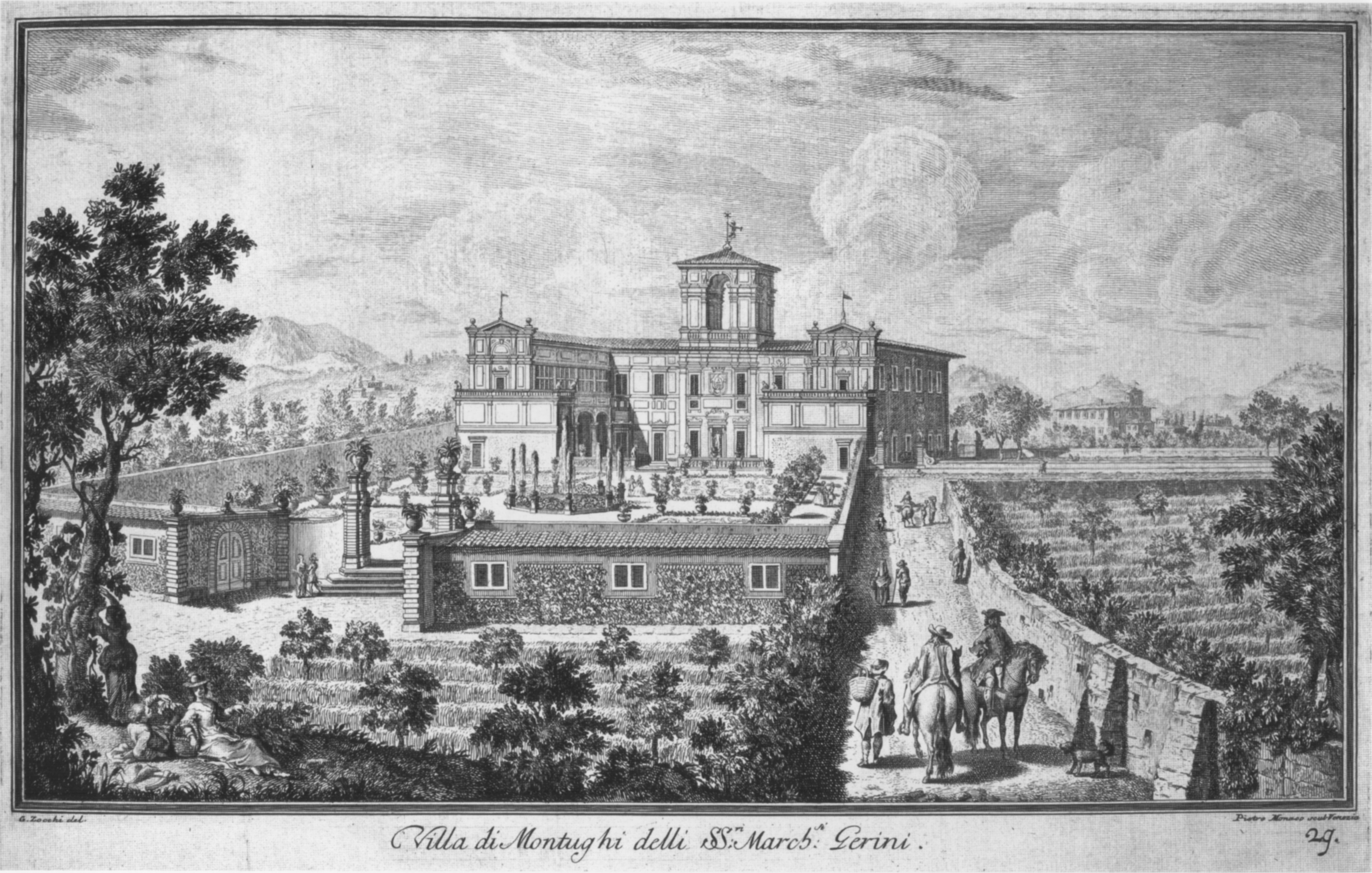 Zocchi, ville 31 montughi